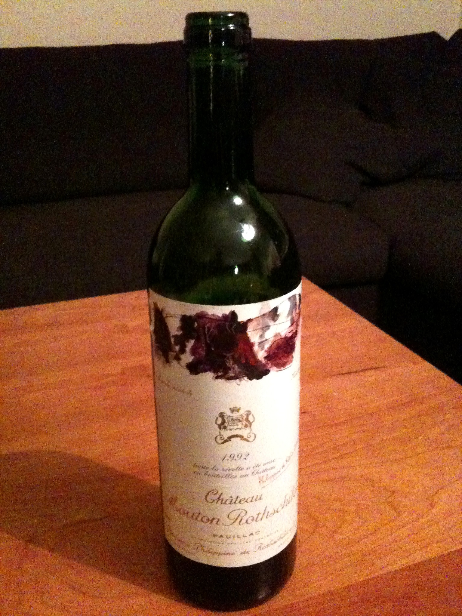 French Bordeaux wine